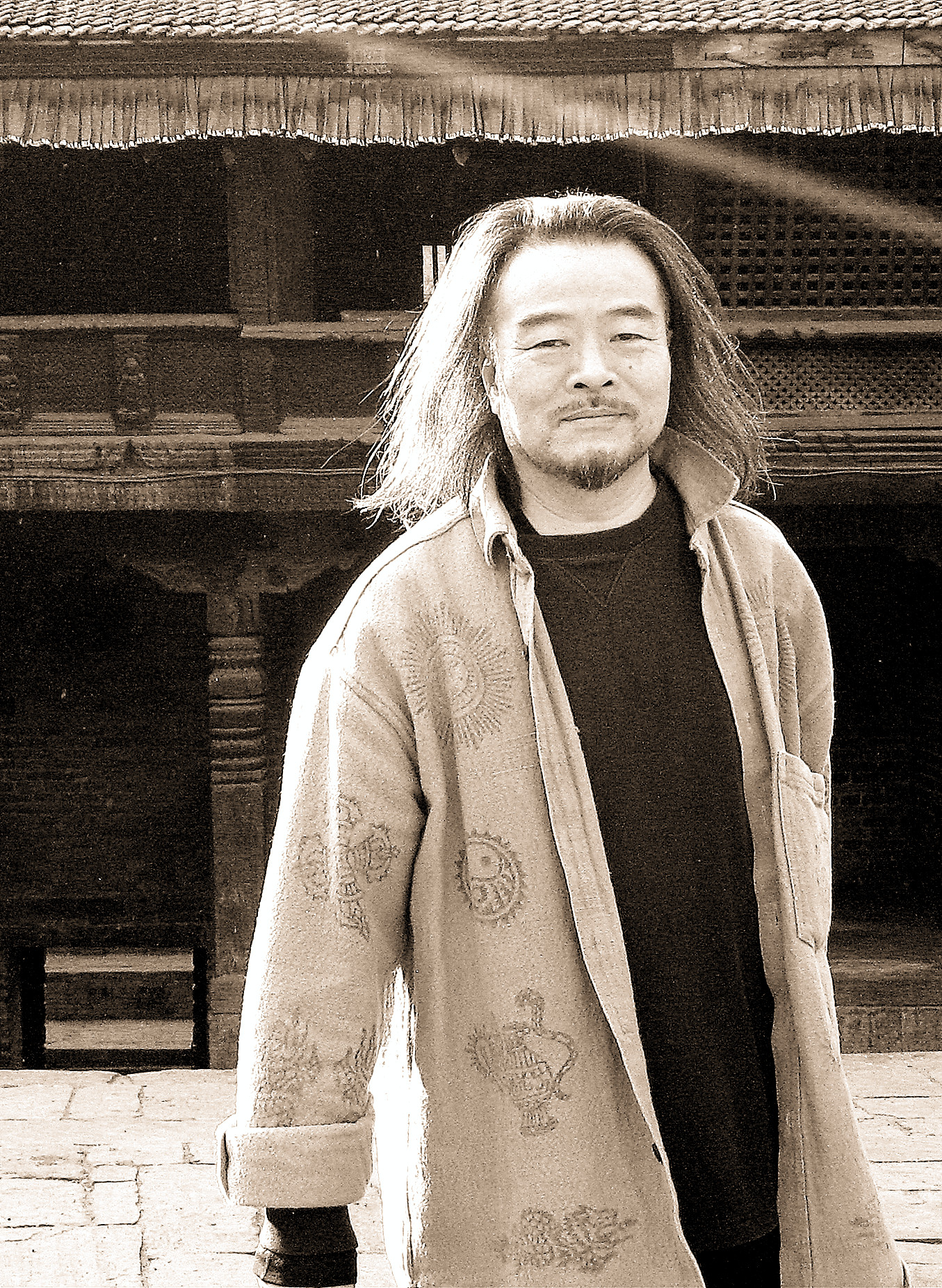 何训田 2009